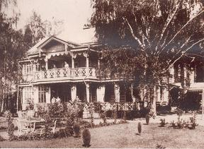 Дача Дмитрия Петровича Бахрушина в Черкизово. Старое фото.